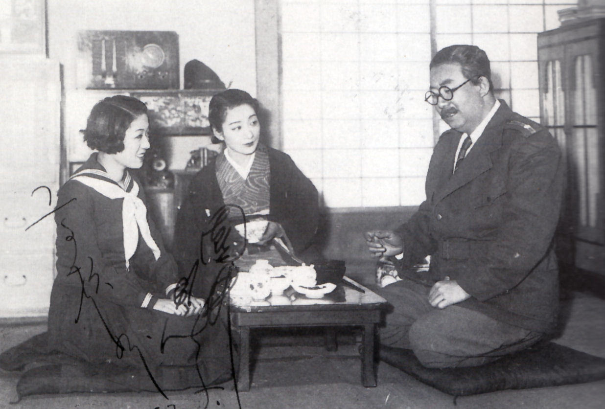 1942年『我が家の幸福』左より高杉妙子、園井恵子、古川ロッパ